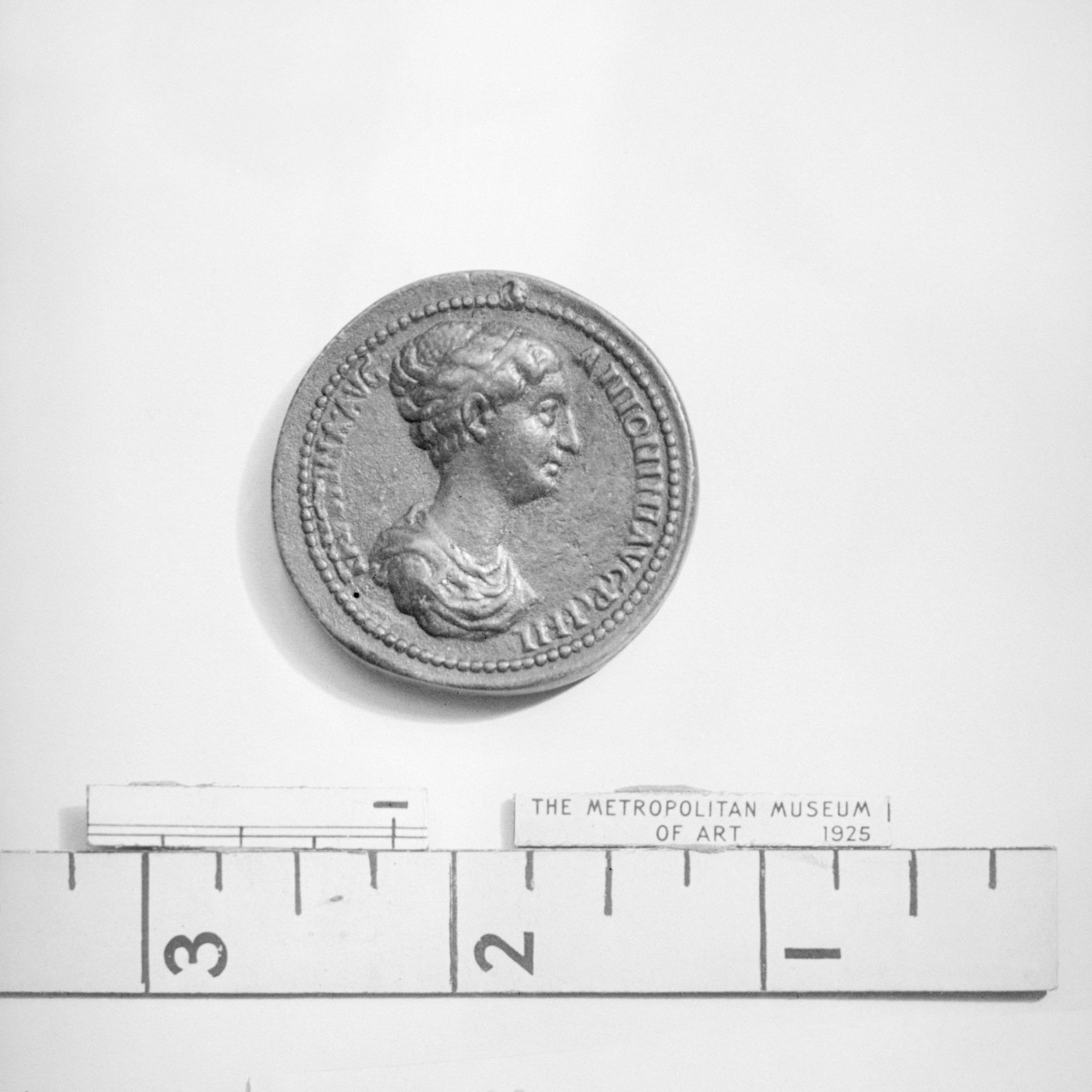 Italian; Medal; Medals and Plaquettes